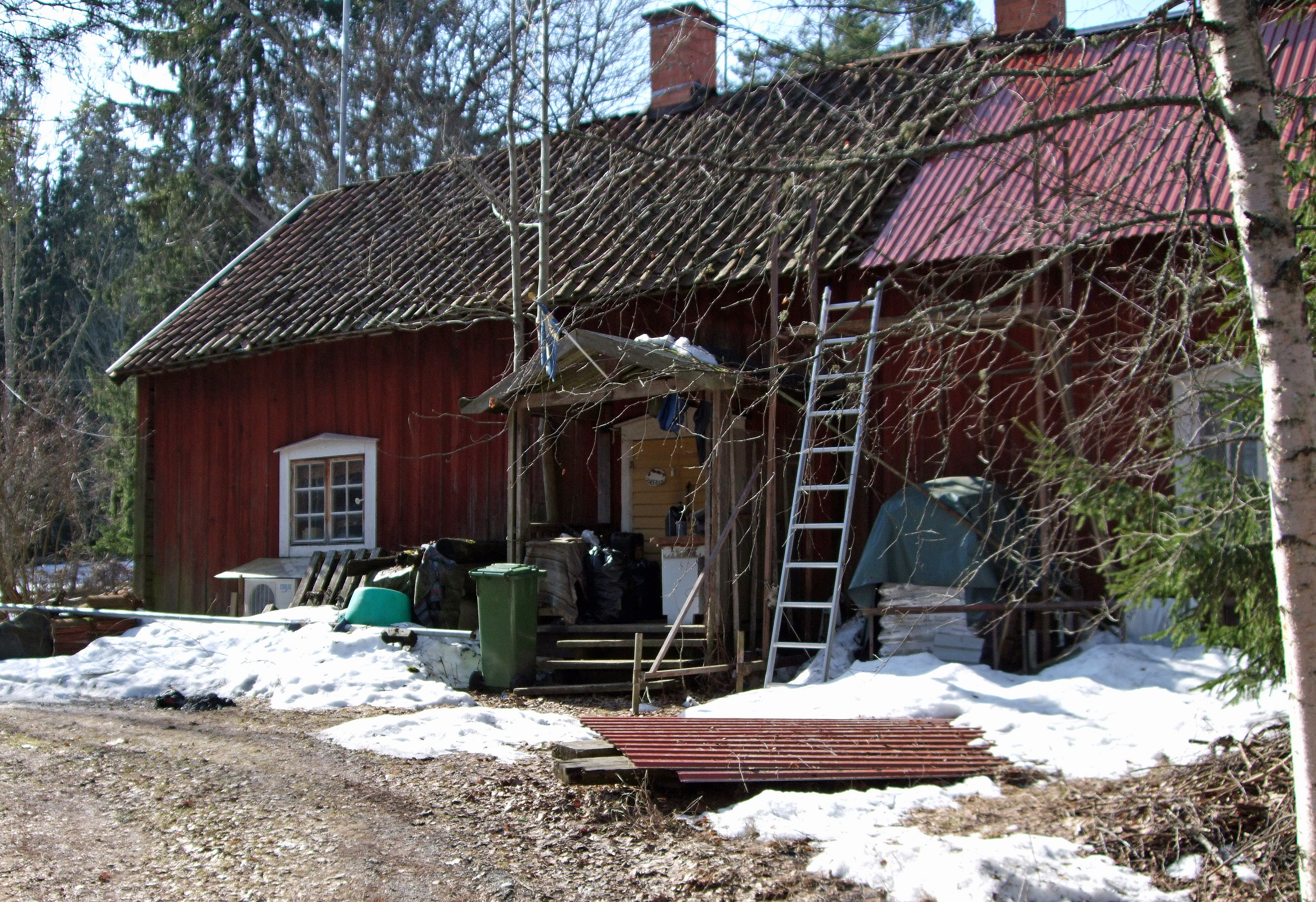 Fattigstugan, Bärbo socken.